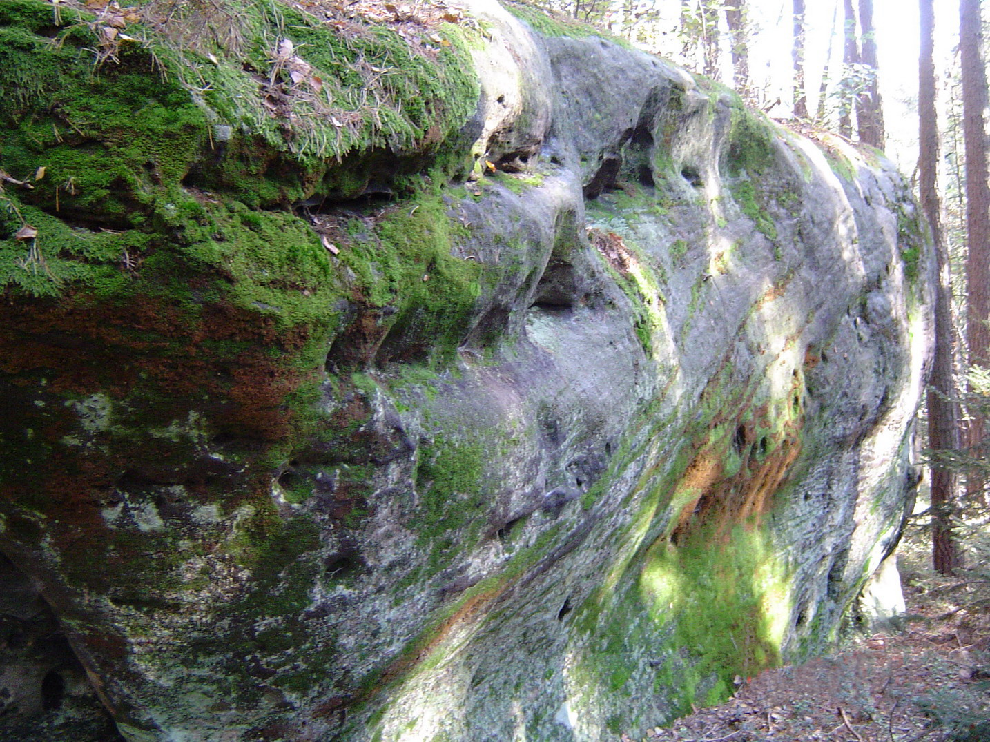 Sattlerstein von Mistelbach - Naturdenkmal (Geotop-Nr. 472R025)